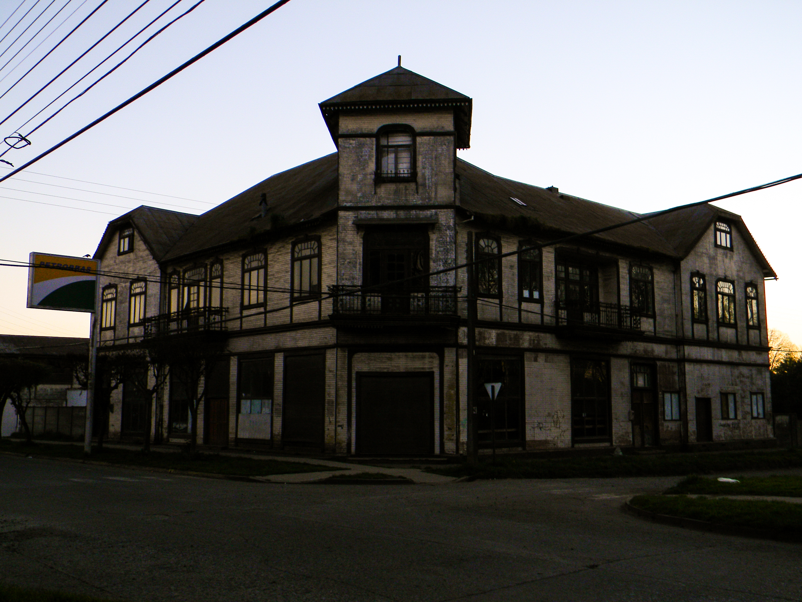 Casa Marchmar (Ex Casa Daniel) This is a photo of a national monument in Chile: 2221